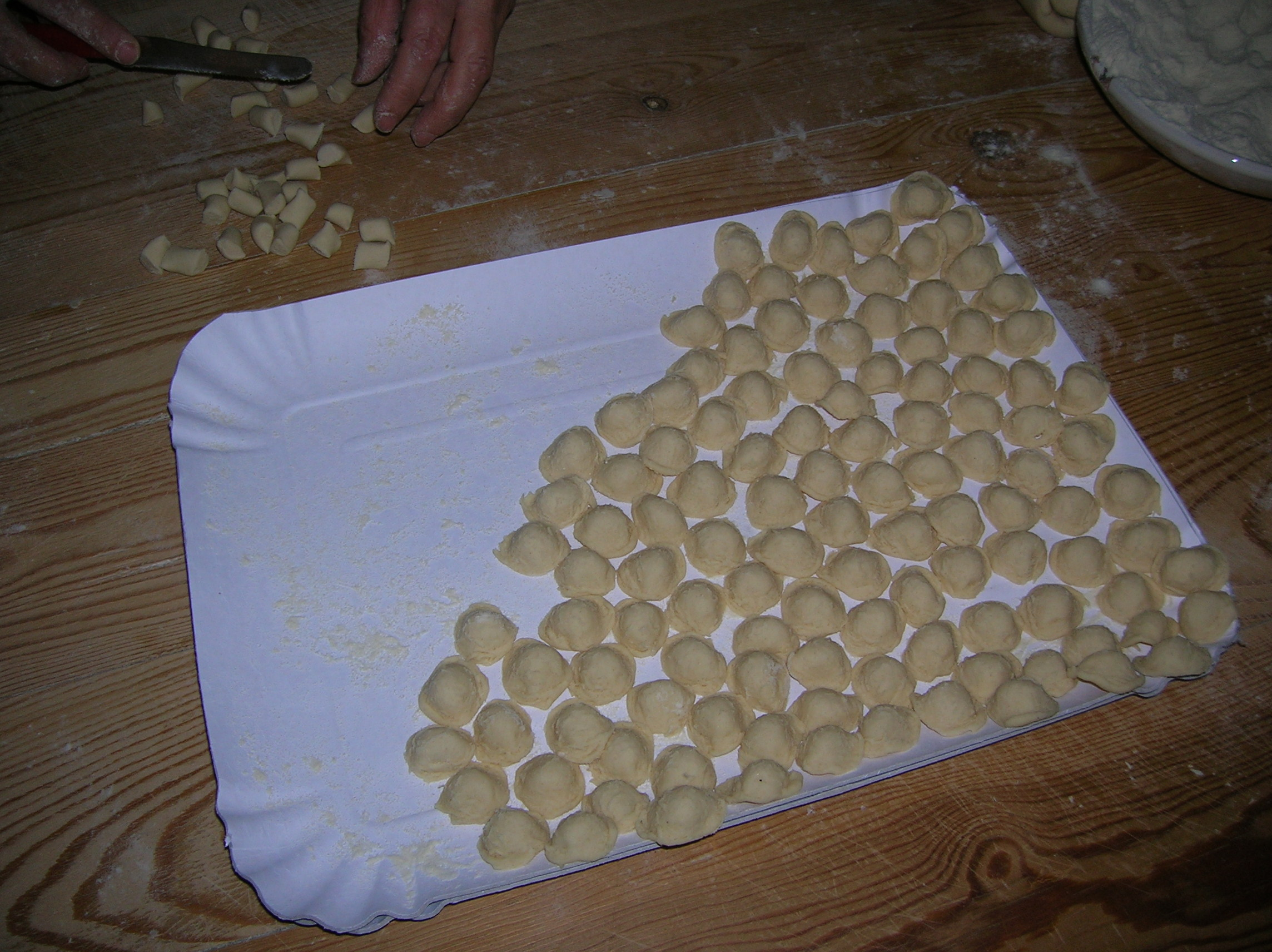 Alessandro Signore; ricchiteddhe: pasta tipica salentina